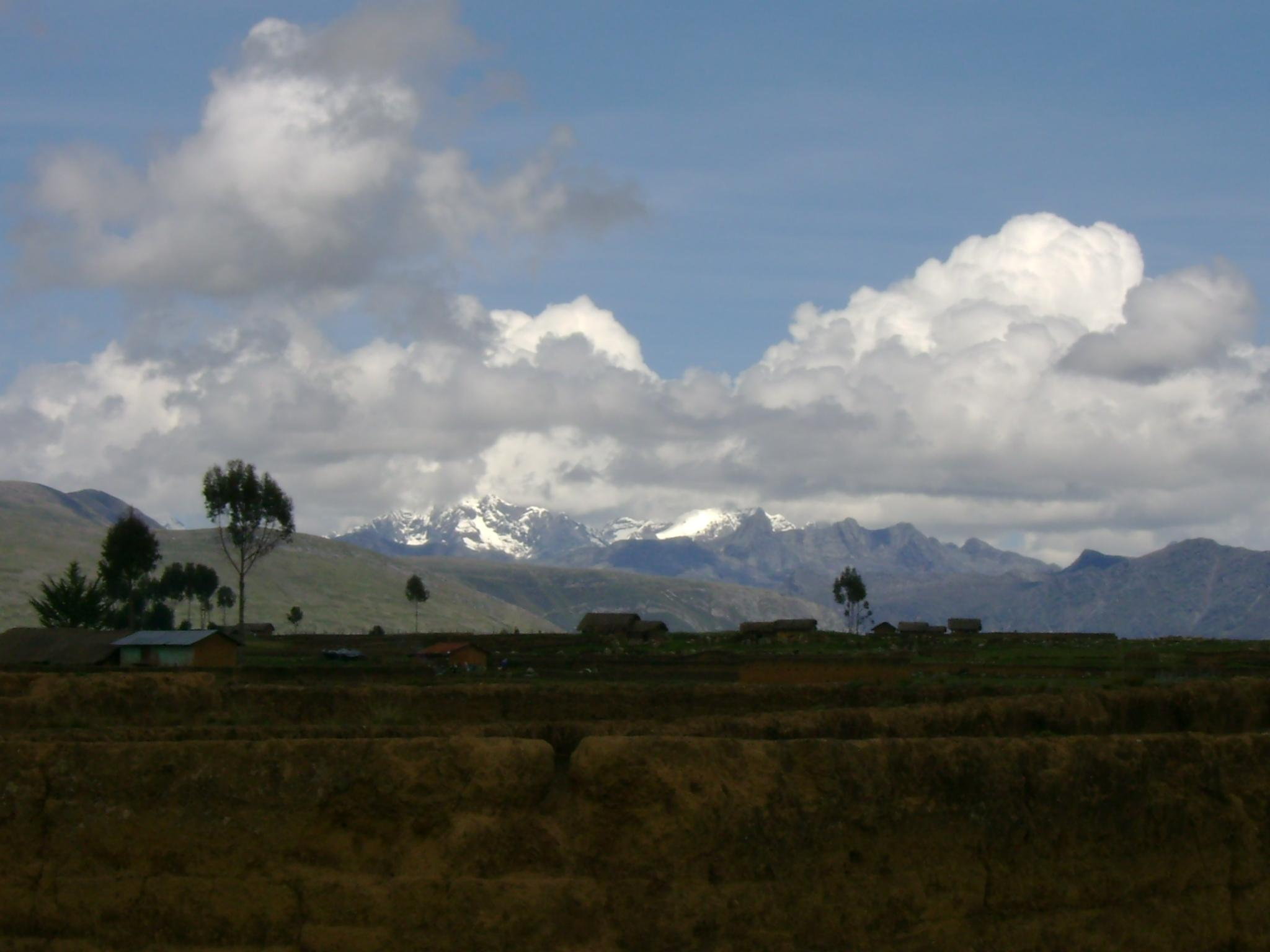 Cordillera de Huallanca.